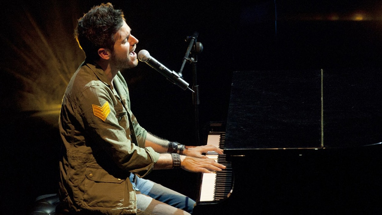 Pablo López tocando el piano